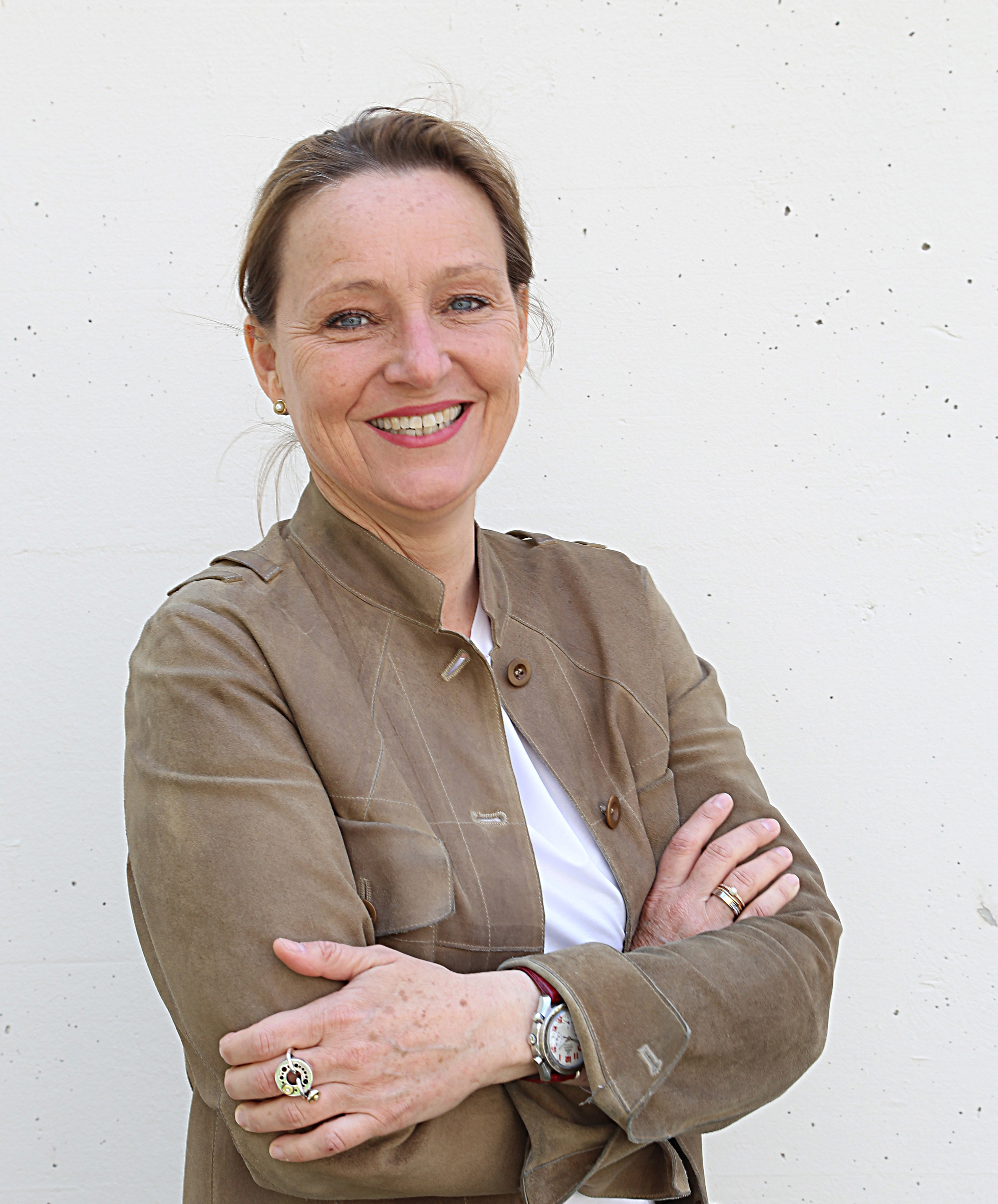 Seit 1.1.2017 leitet Frau Mag. Dr. Doris Formann den Gesundheitsdienstleister mit Sitz in Linz (Oberösterreich).